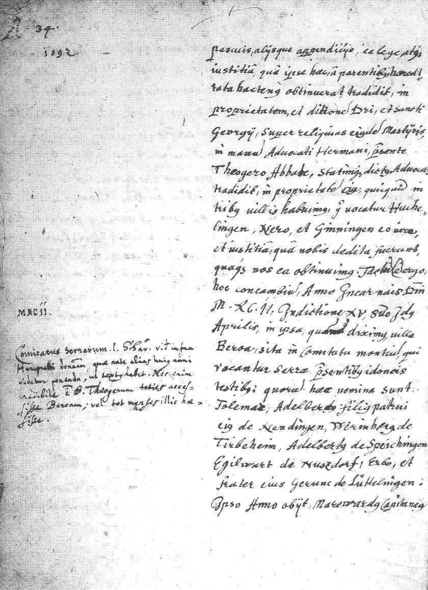 Adalbert, Eberhard und Folkmar von Nendingen in einer Urkunde des Klosters St. Georgen von 1092 in lateinischer Sprache, erste urkundliche Erwähnung von Nendingen